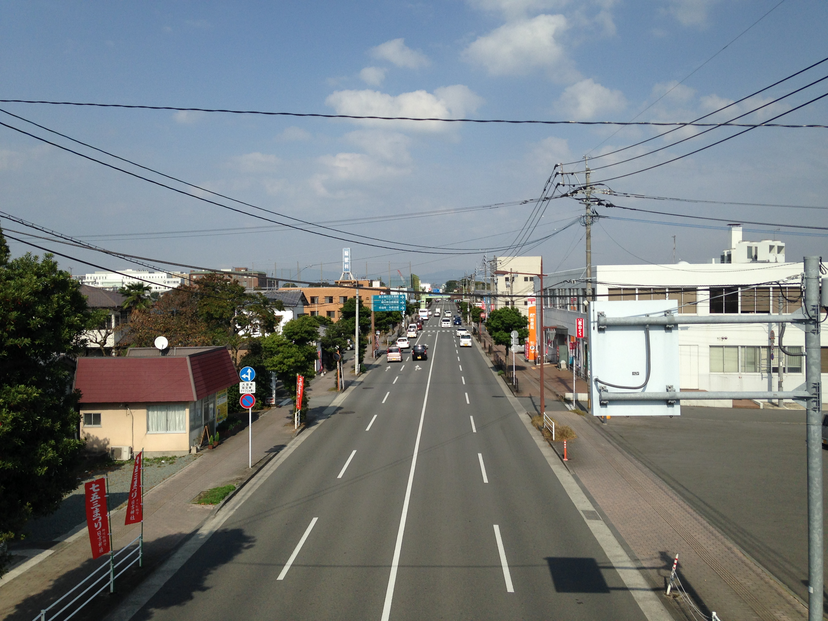 山王歩道橋より望む福岡県道770号(北側)